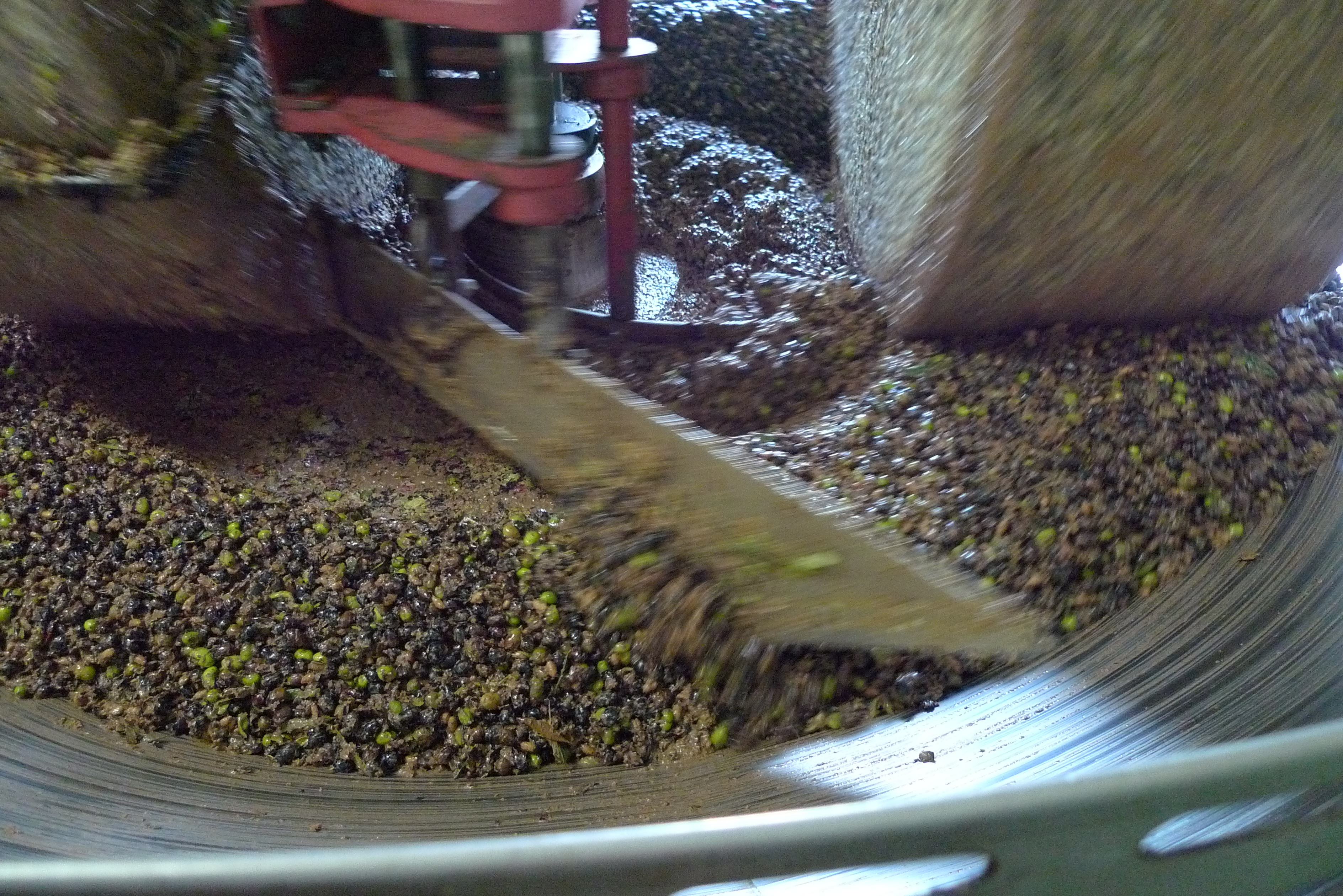 foto ravvicinata della macina in movimento, Mahlgranitsteine an der Arbeit